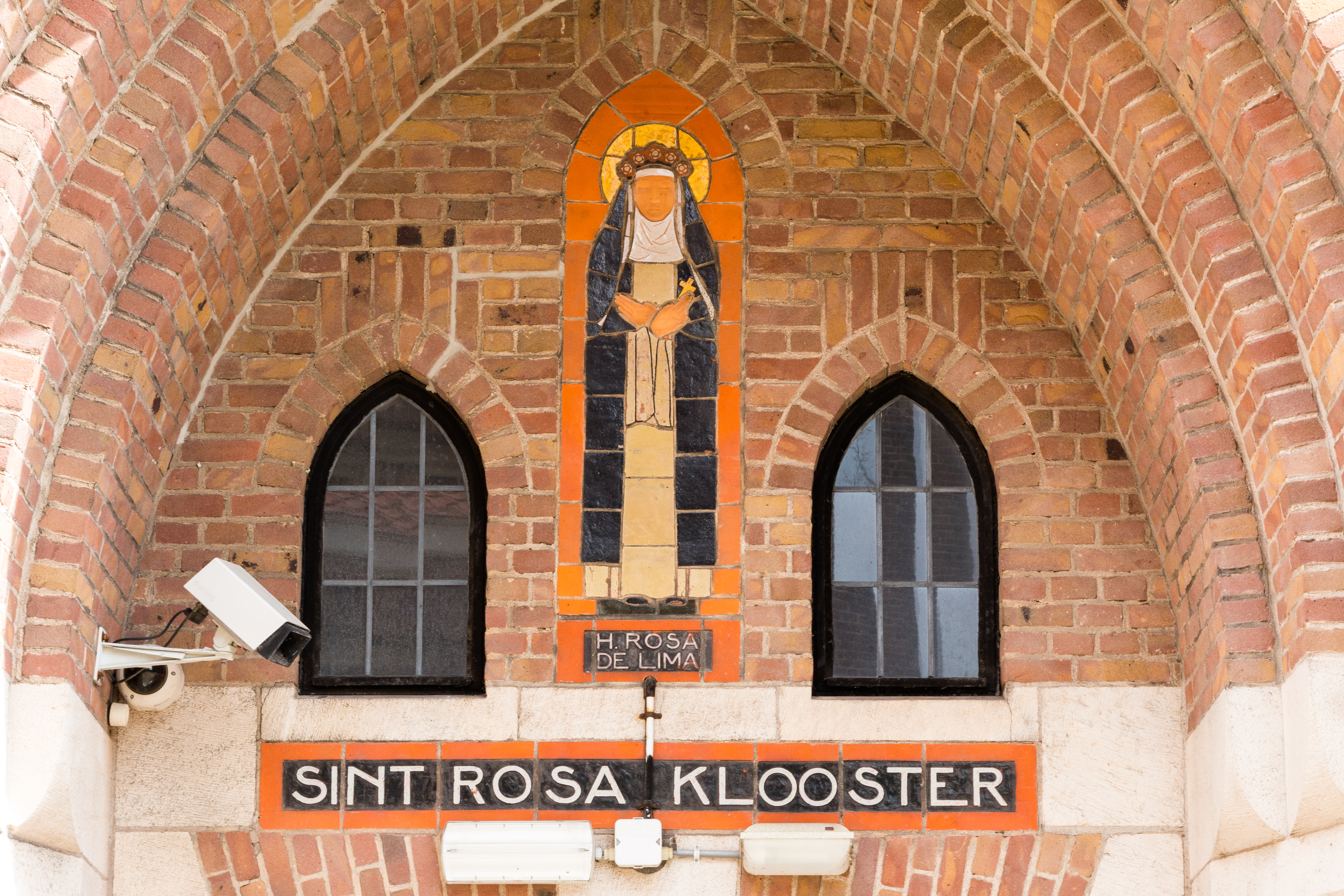 Tympaan boven een ingang van het Sint-Rosaklooster in Amsterdam-Noord